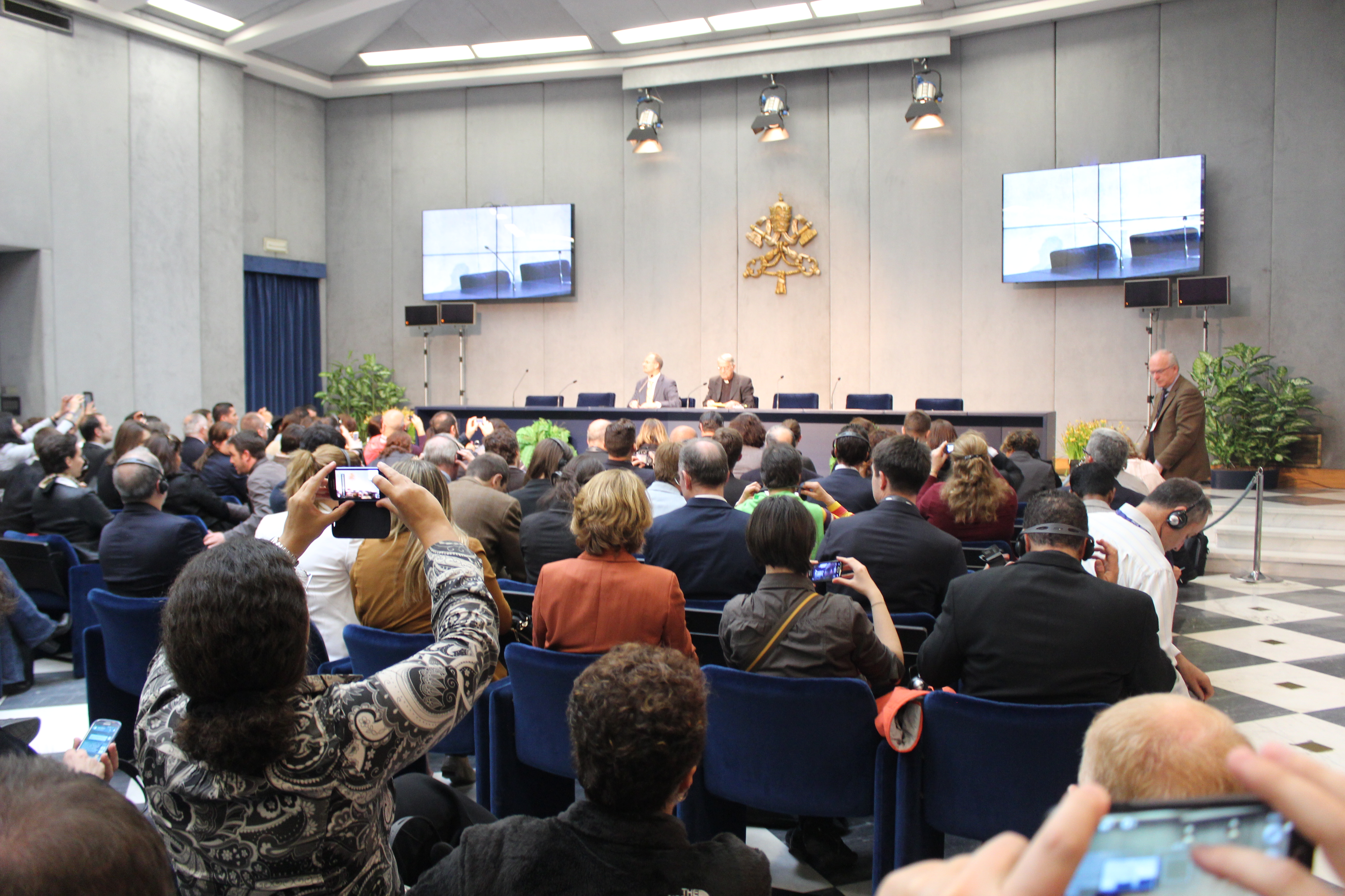 La Sala Stampa es el nombre que recibe la sala de prensa del Vaticano.